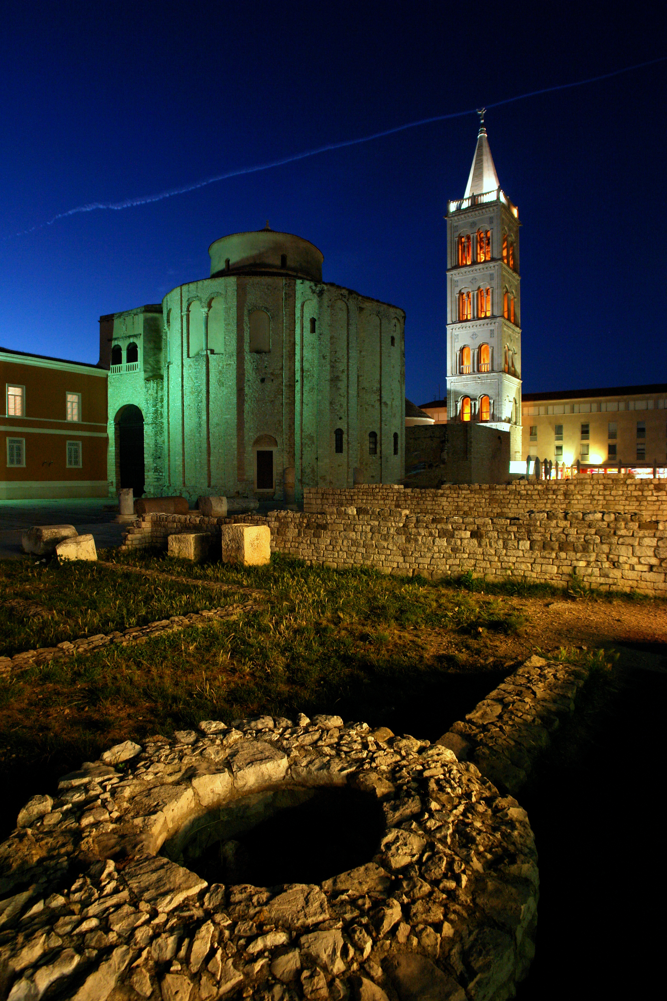 Szent Donát-körtemplom, Zára. Crkva Sv. Donata, Zadar. Church of St. Donatus in Zadar.